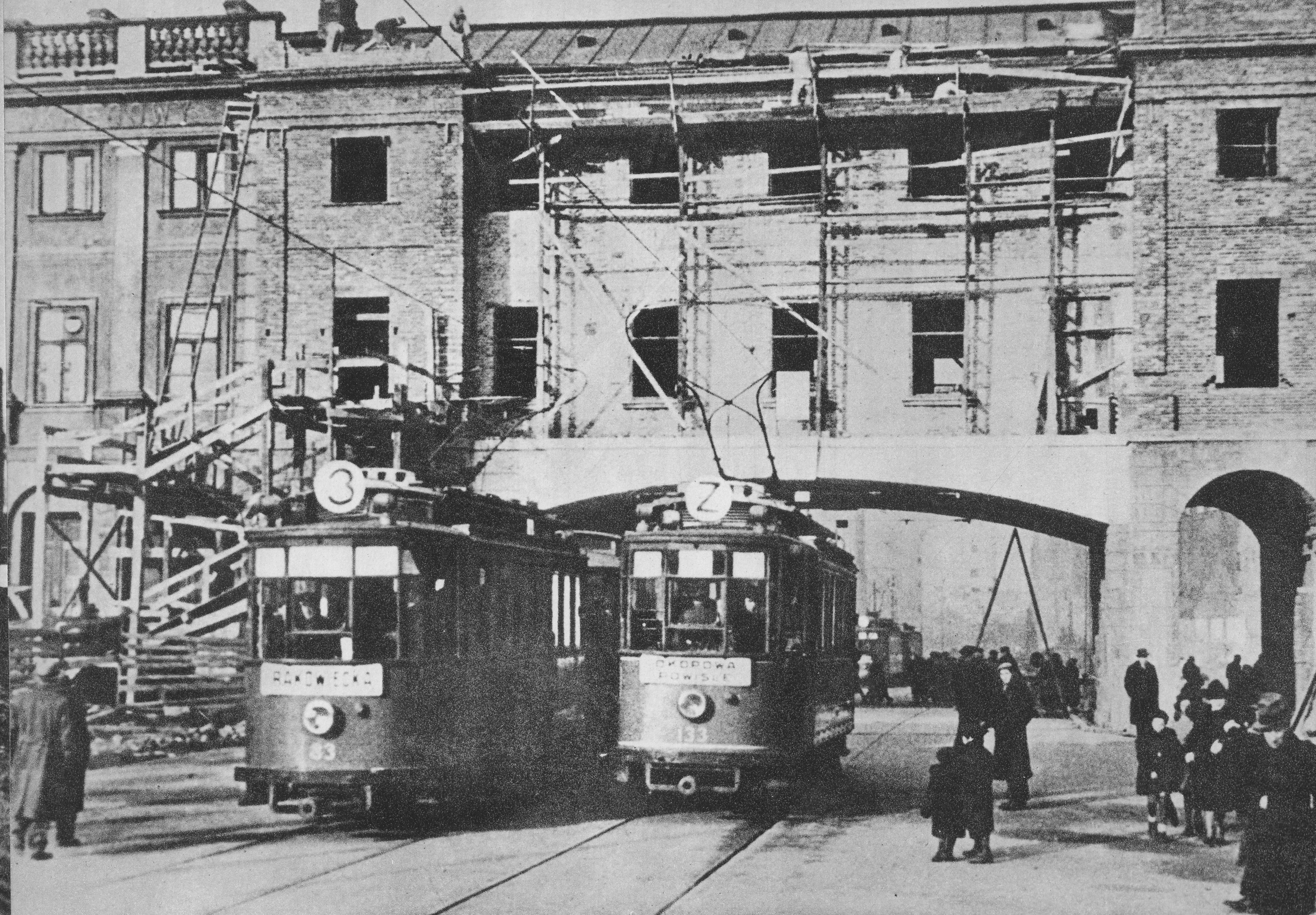 Plac Krasińskich w Warszawie, przebity przejazd w ciągu ul. Bonifraterskiej